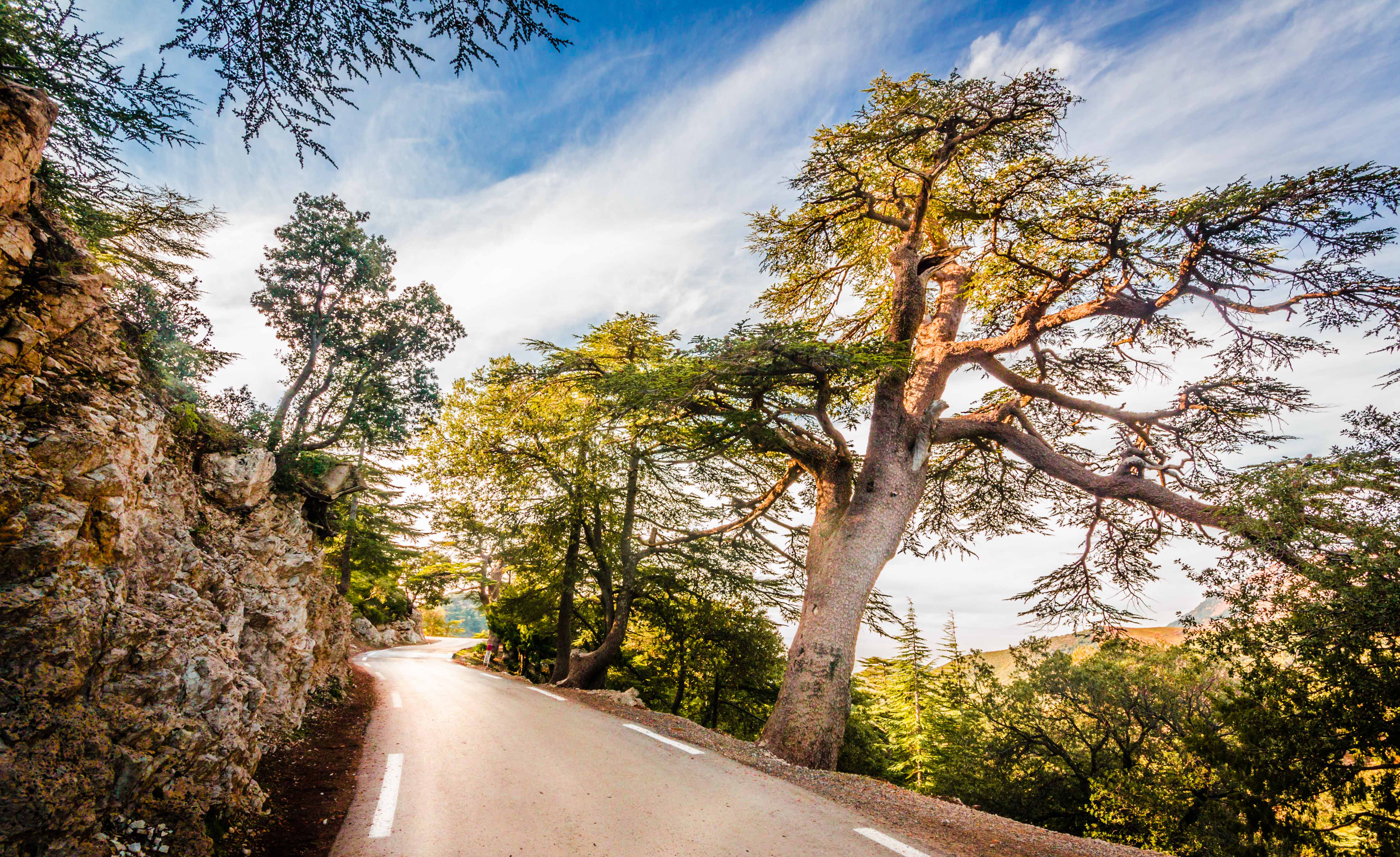 Lever de soleil sur une route à Tikjda (El Asnam, Algérie).